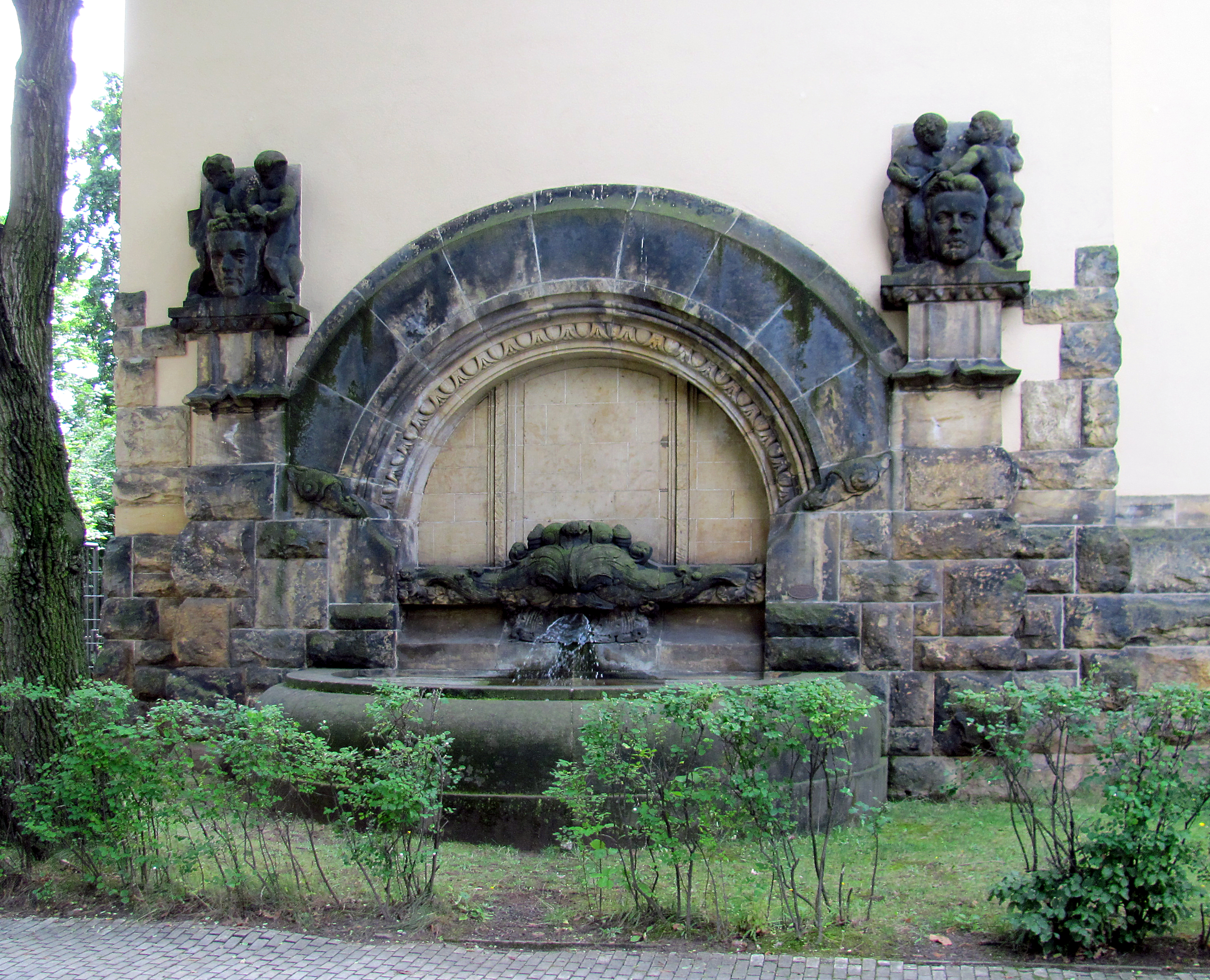 Radebeul-Serkowitz, Steinbachhaus, Brunnen